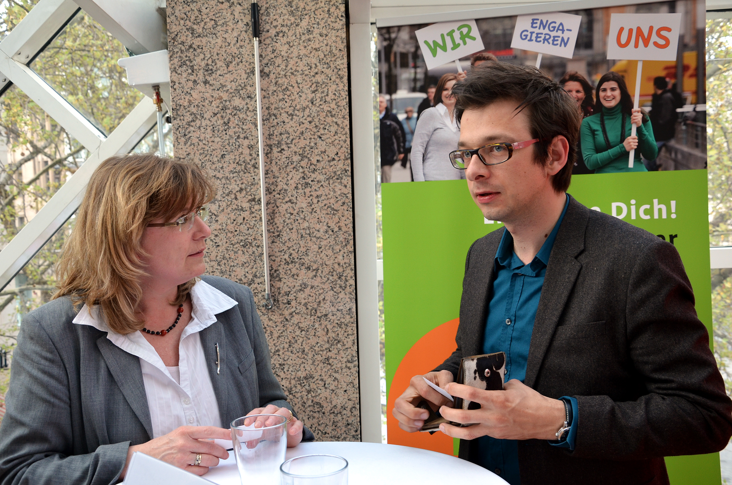 Austausch der Visitenkarten nach der Veranstaltung Gemeinsam – gut leben in Stadt und Region! Ein Stadtgespräch zur Lebensqualität in Hannover; Almut Maldfeld, Geschäftsführerin des Freiwilligenzentrums Hannover, im Gespräch mit dem aus Berlin angereisten Sebastian Beck, wissenschaftlicher Referent vom vhw – Bundesverband für Wohnen und Stadtentwicklung ...